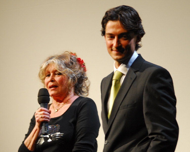 Œuvre de Christophe Marie - publiée par Arnaud 25 : Brigitte Bardot et Christophe Marie (porte-parole de la Fondation Brigitte Bardot) pour leurs anniversaires respectifs et pour les 20 ans de la Fondation Brigitte Bardot au Théâtre Marigny le 28 septembre 2006